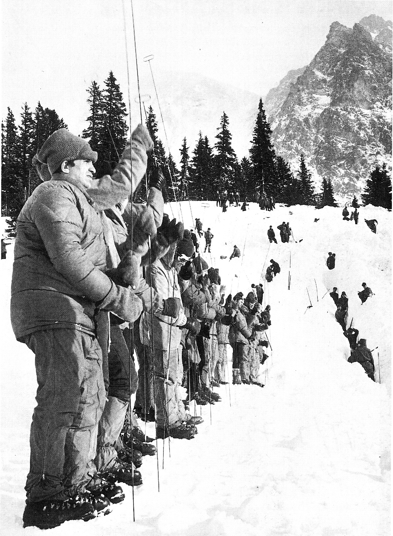 Sondovanie v lavíne - Mengusovská dolina 21.1. 1974